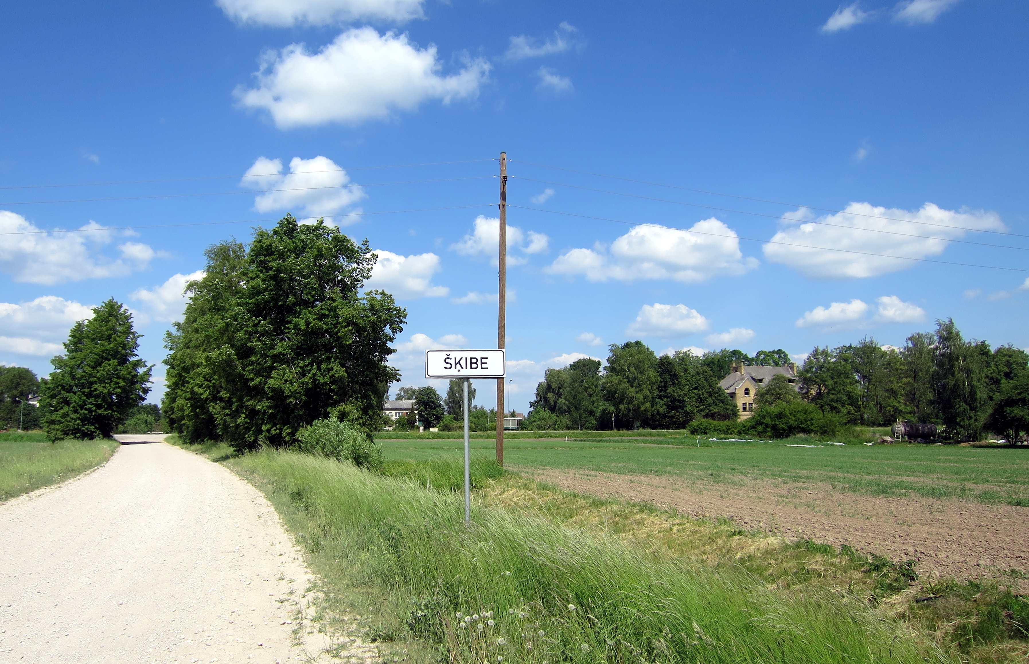 Skats uz Šķibi no ceļa V1105